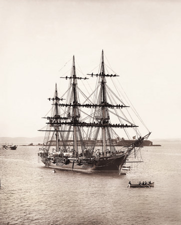 Cruzador Almirante Barroso Marinha do Brasil - Naval ship of Brazil.